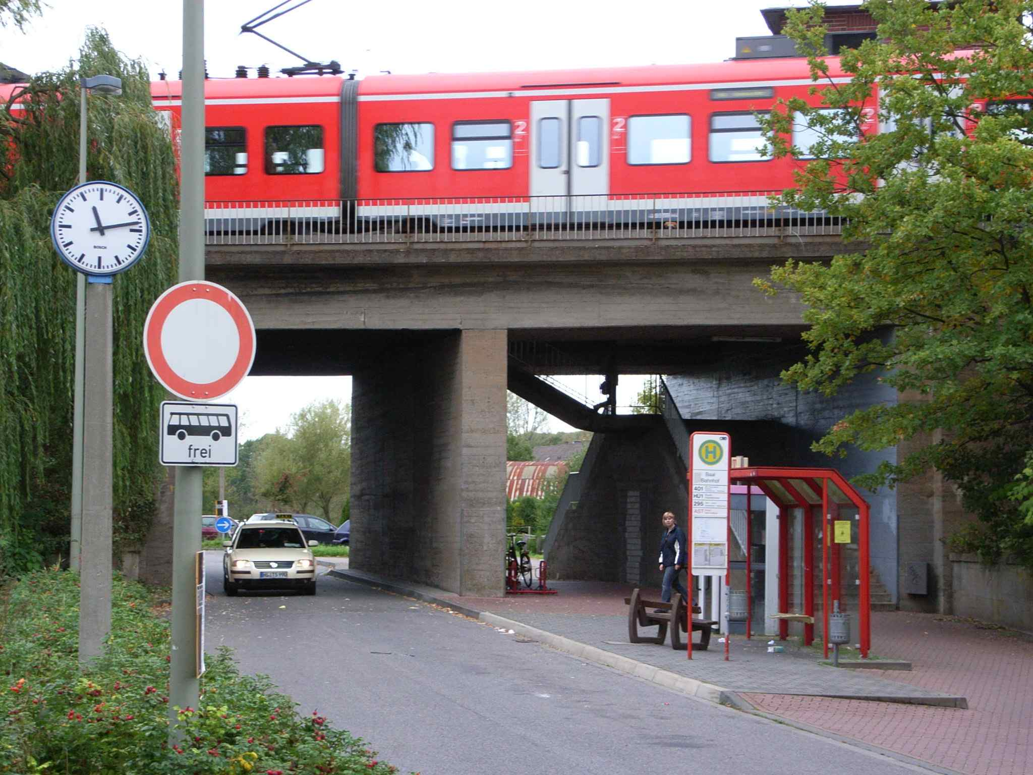 Turmbahnhof Hückelhoven-Baal